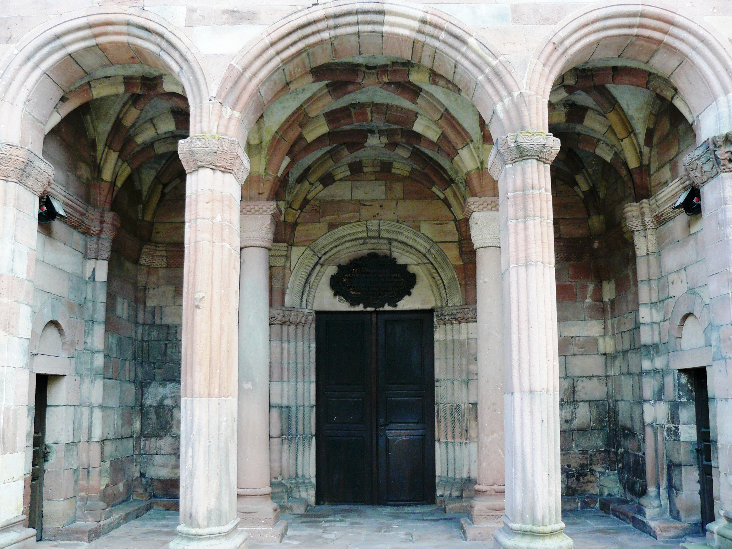 Lautenbach 125.JPG